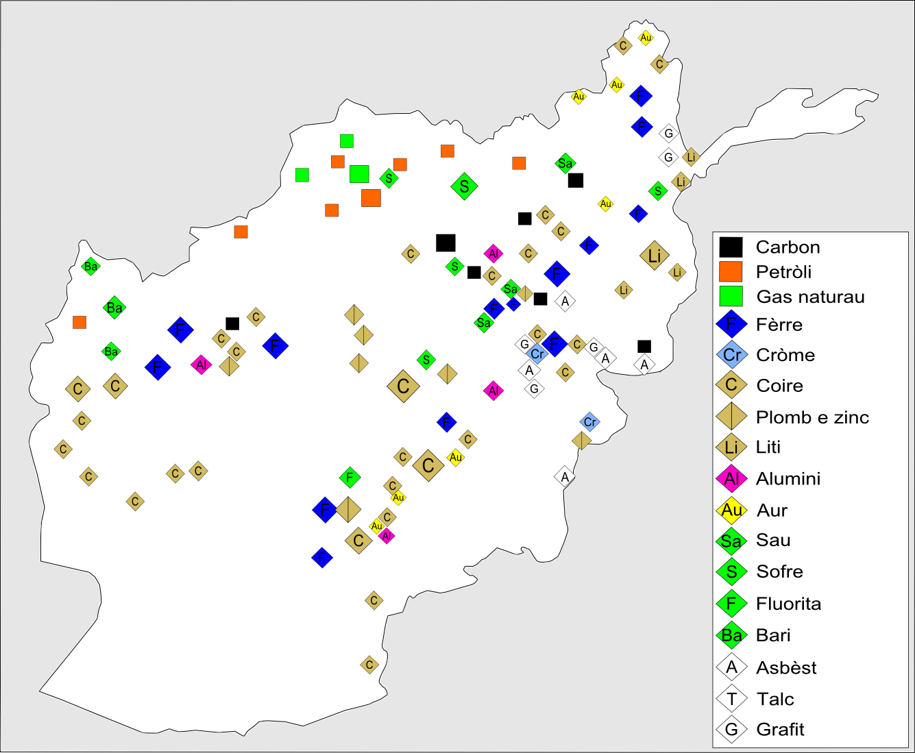 Ressorsas naturalas principalas d'Afganistan.